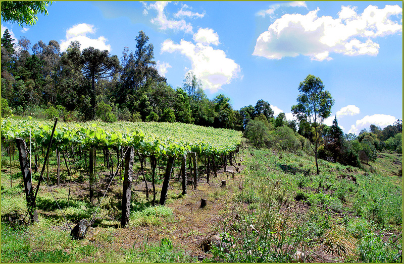 Paisagem típica do interior de Caxias do Sul, com um parreiral ainda cultivado na forma tradicional. Brasil.